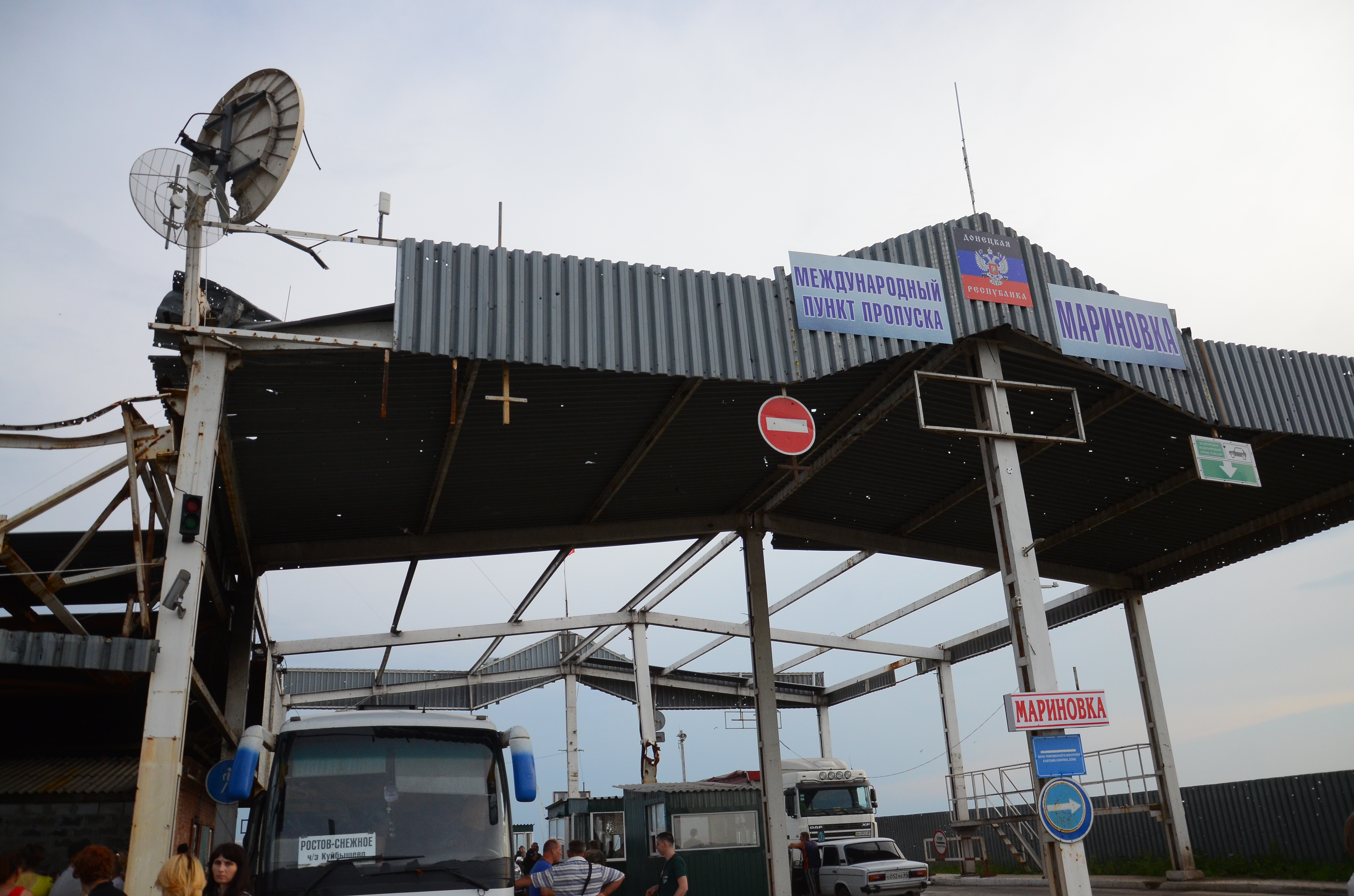 Пункт пропуска ДНР